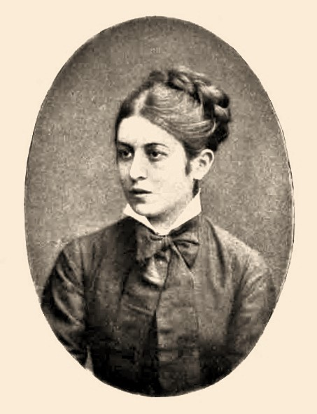 Vera Nikolaevna Figner